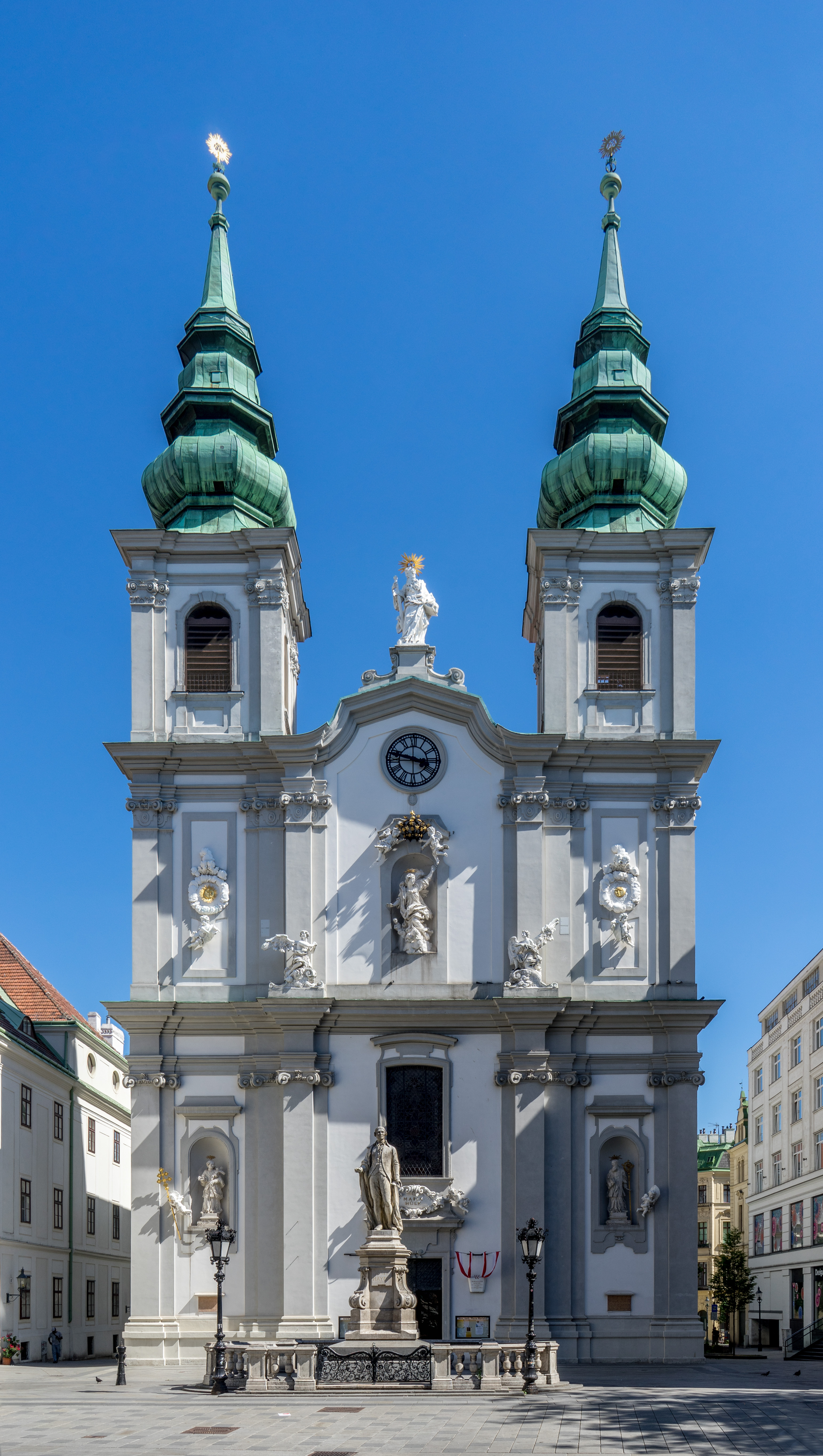 Mariahilfer Kirche, Vienna